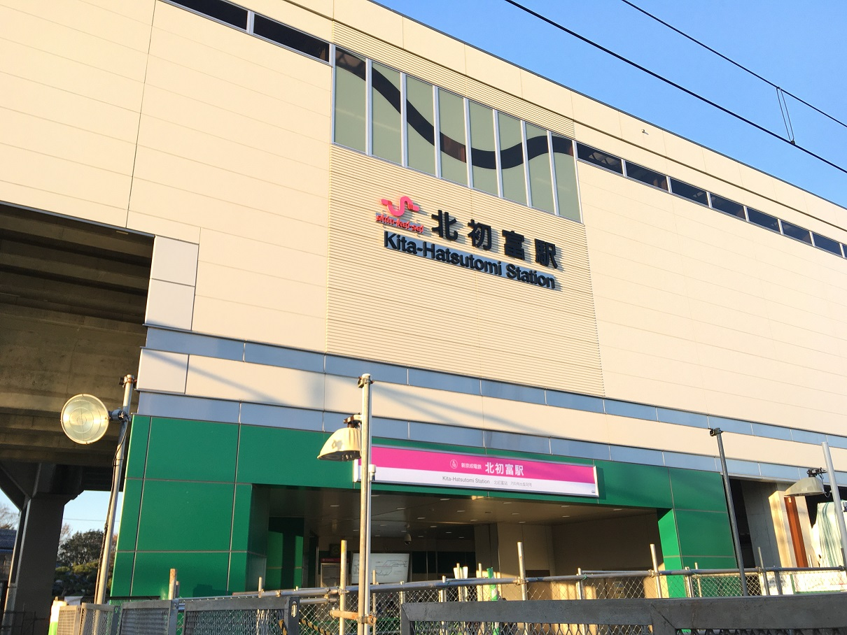 北初富駅新駅舎